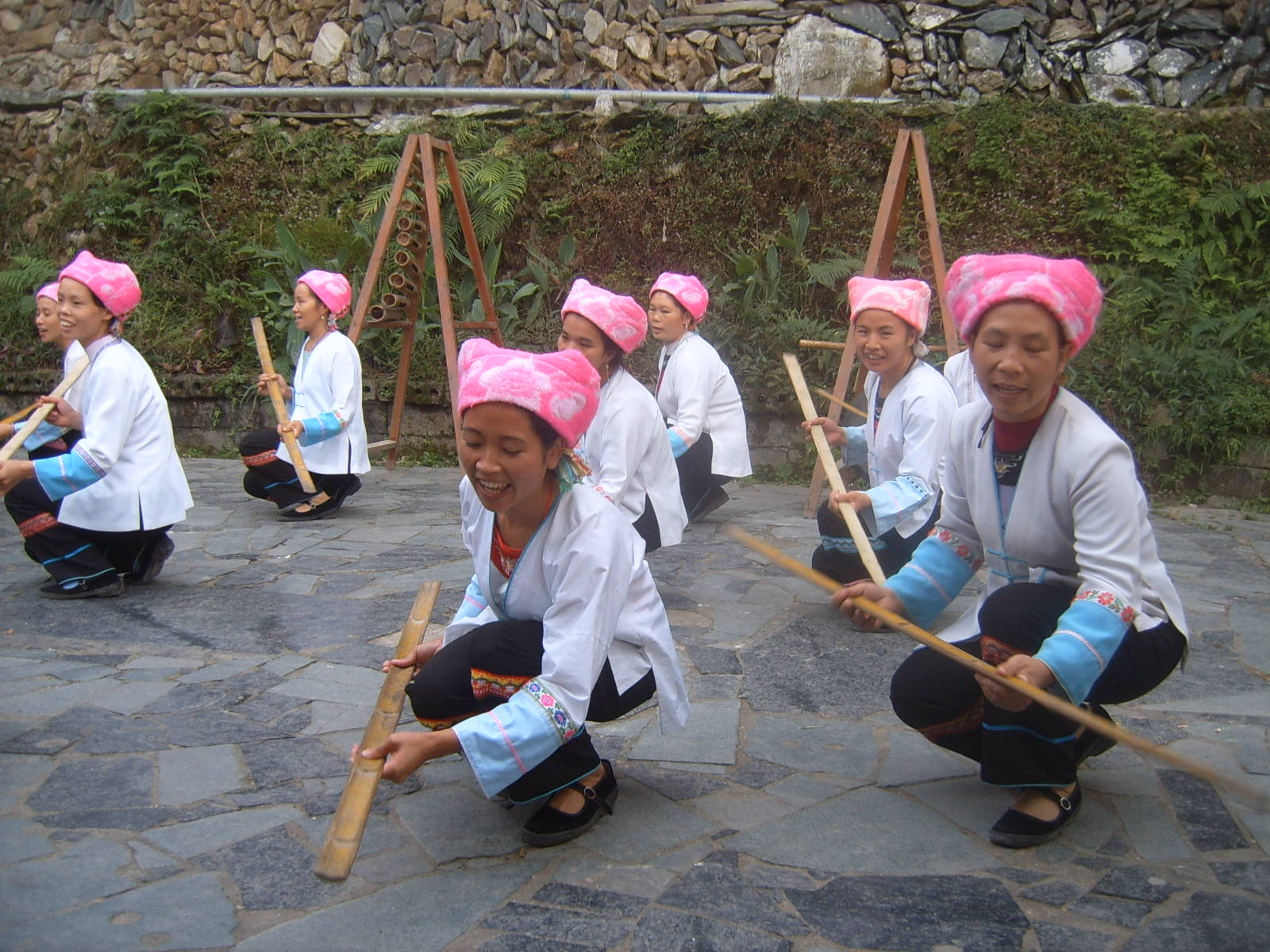 Traditional Zhuang (peuple) dance in Ping'an